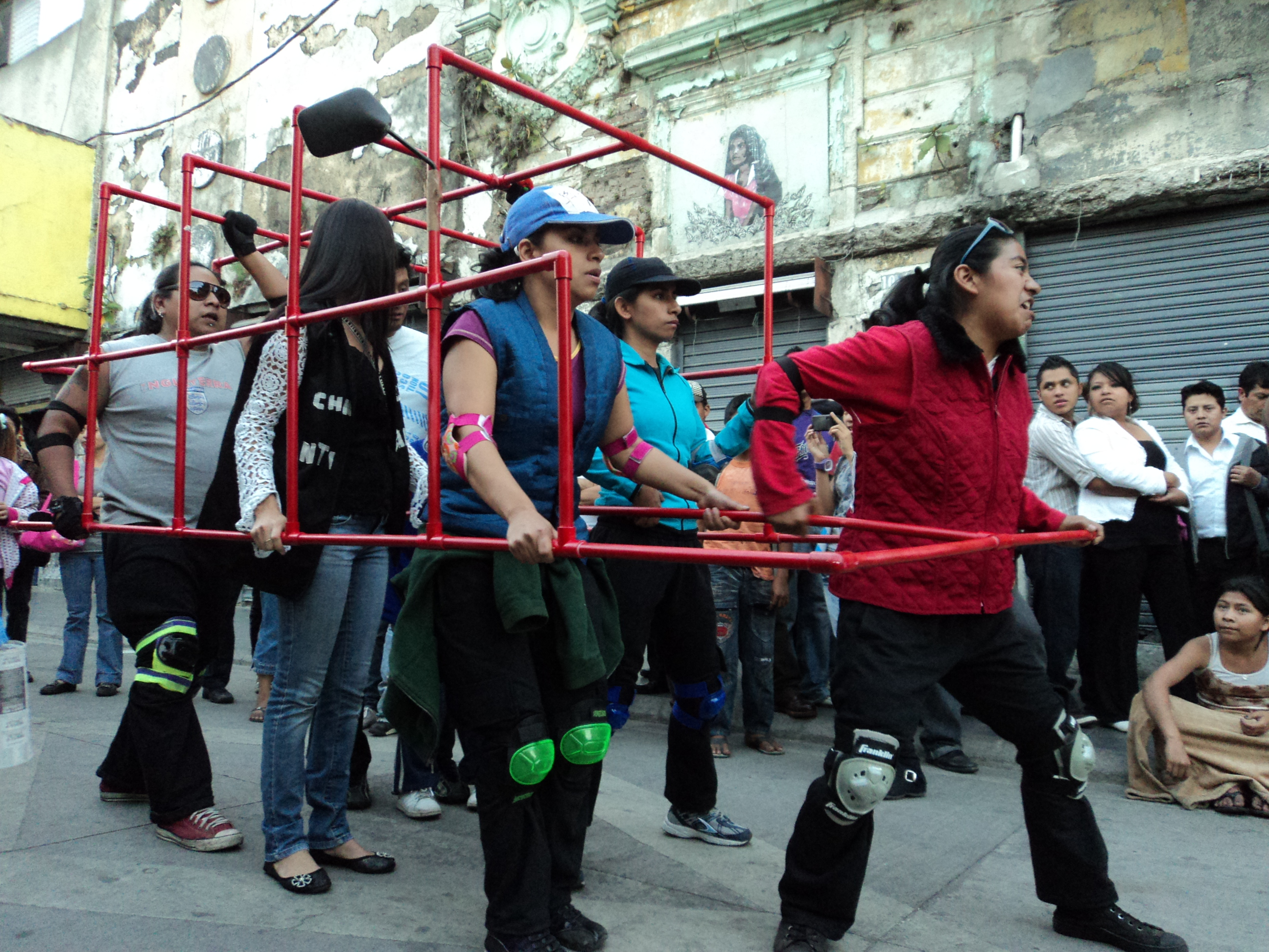 El motor del Bus (Exceso de Velocidad), presentado en el Paseo de la Sexta, de la Ciudad de Guatemala.